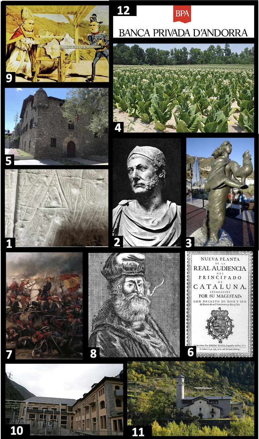 La història d'Andorra en breus imatges.